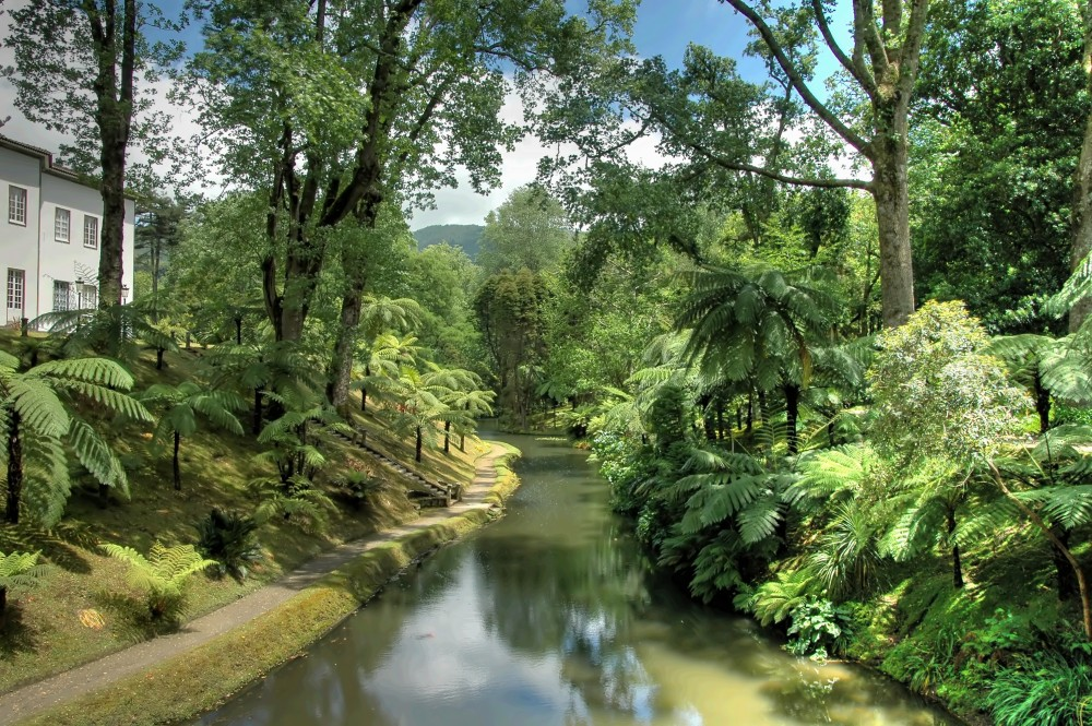 Terra Nostra Garden in Furnas, São Miguel, Azores